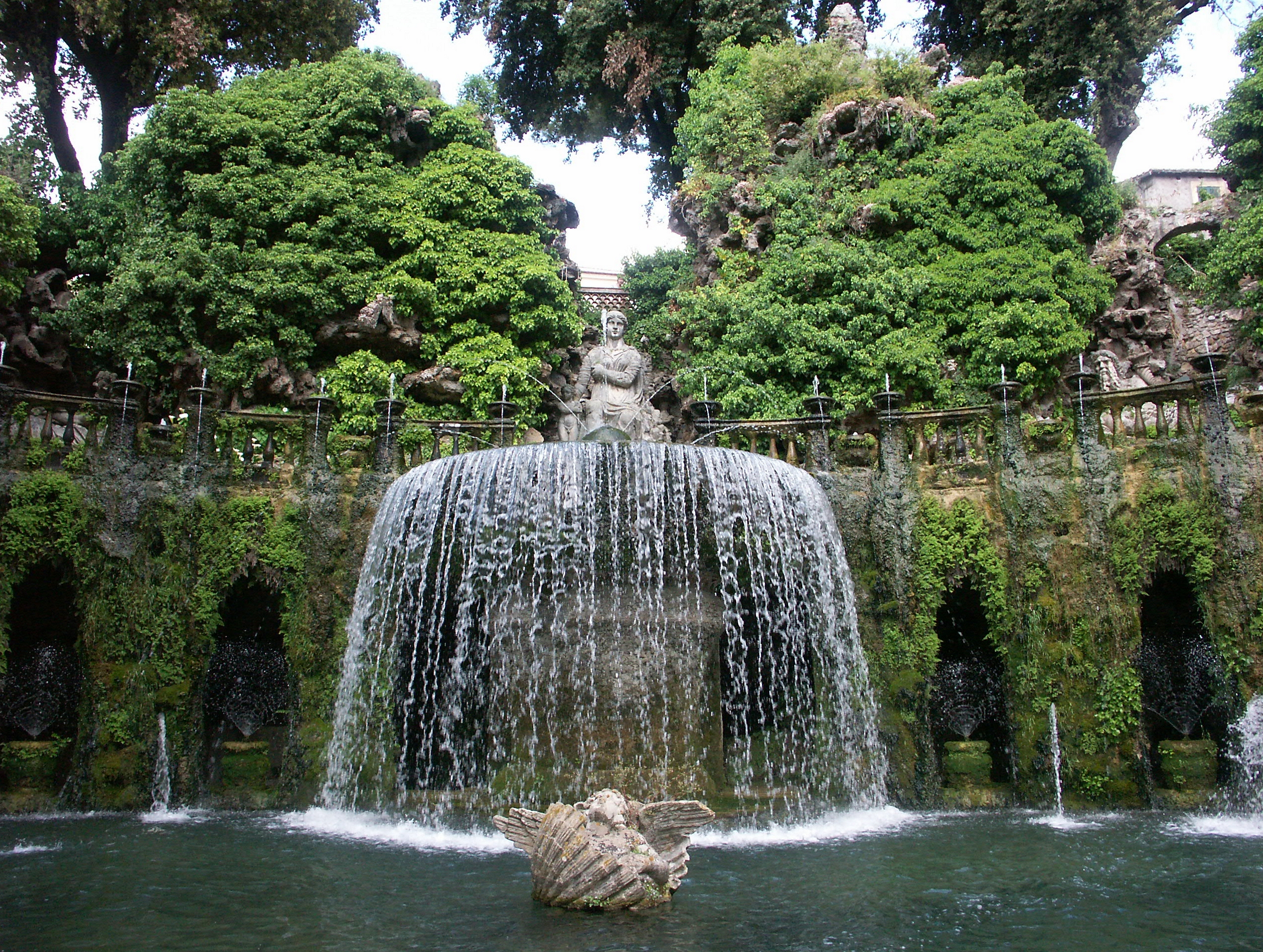 Tivoli, Villa d'Este, Fontana dell'Ovato